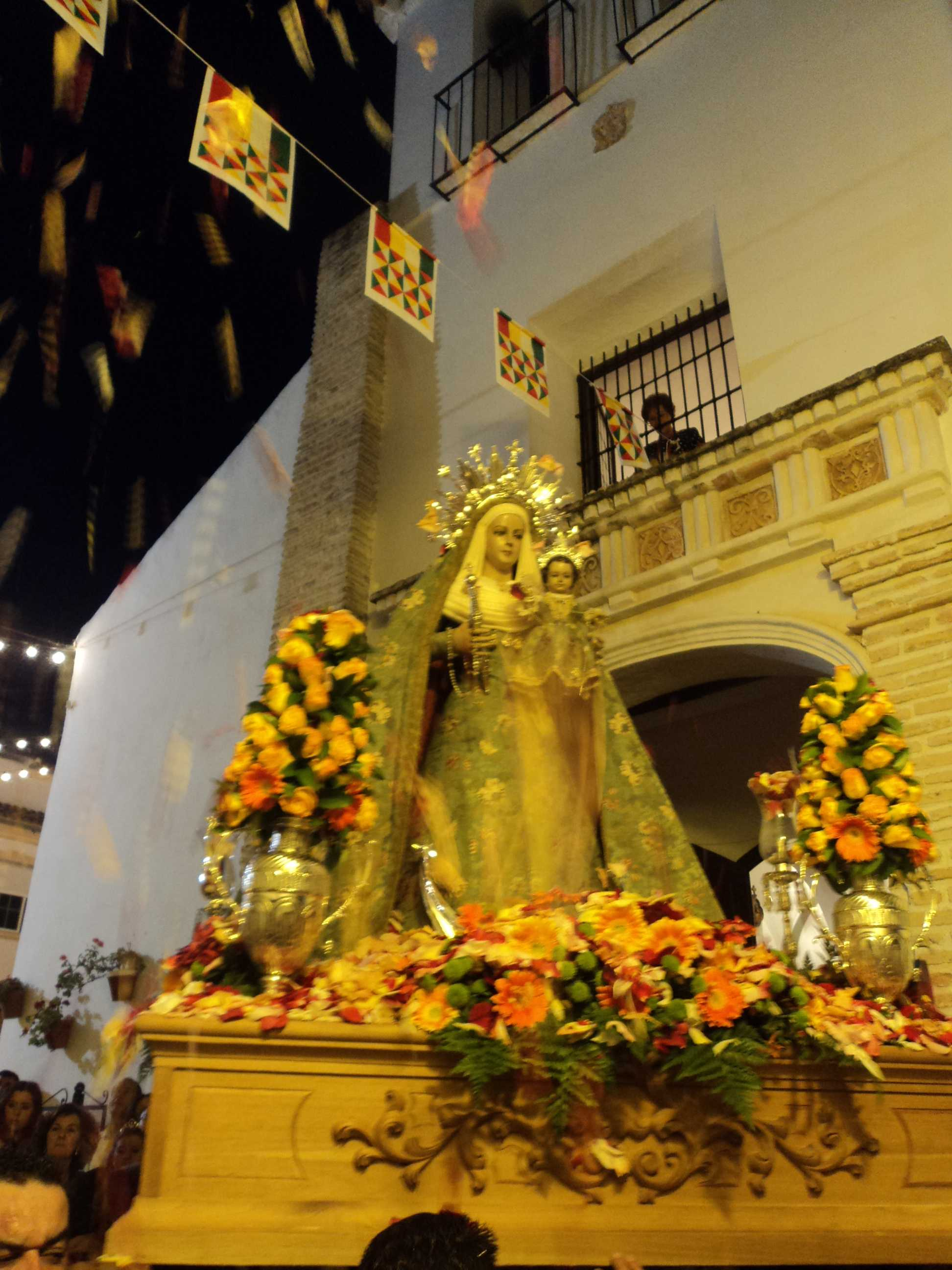 La Virgen entrando en su santuario tras la procesión de gloria celebrada cercana a las fechas de la Cruz de Mayo.